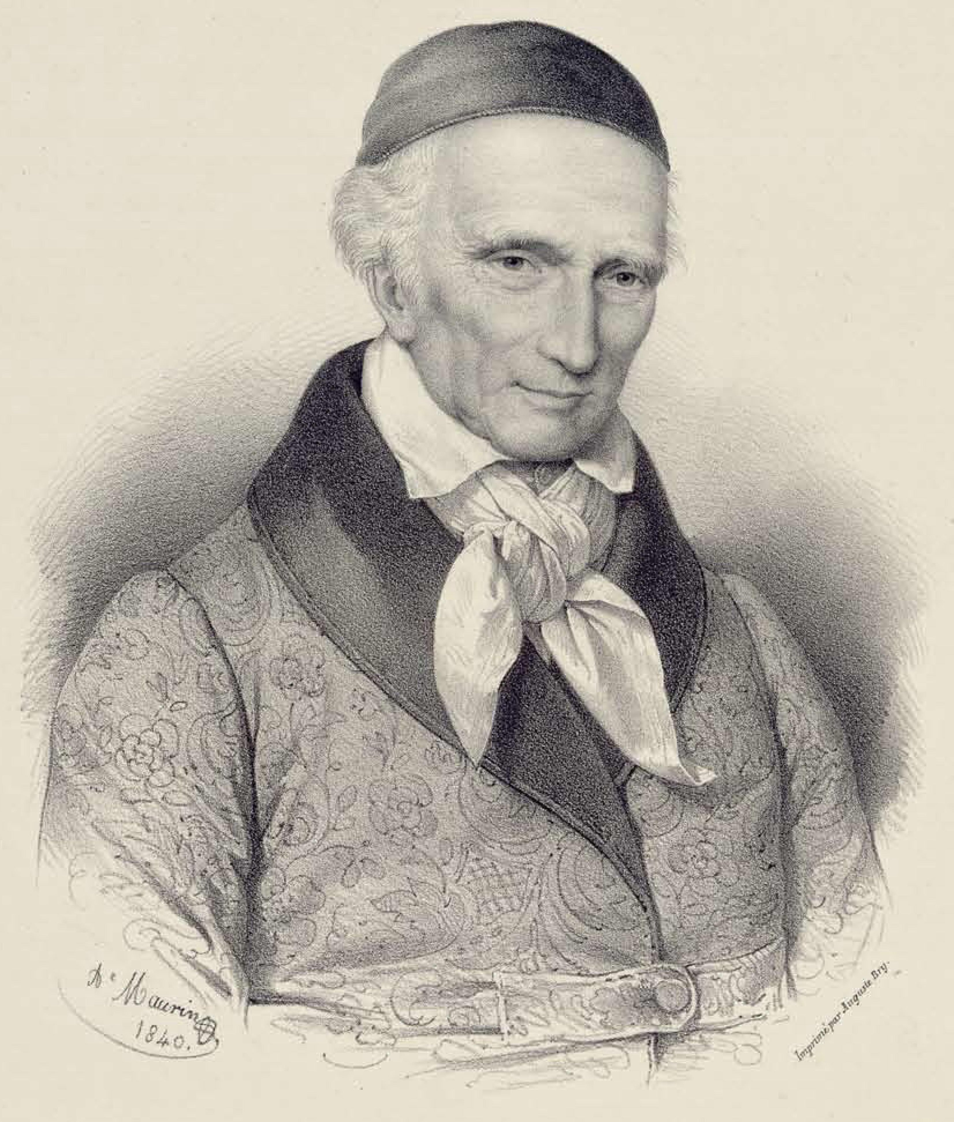 Ludwig Heinrich von Nicolay, nach dem Leben entworfen, als derselbe sein Achtzigstes Jahr erreicht hatte